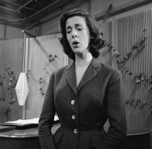 Jetty Paerl in het Nederlandse televisieprogramma Het Oog Wil Ook Wat in 1956